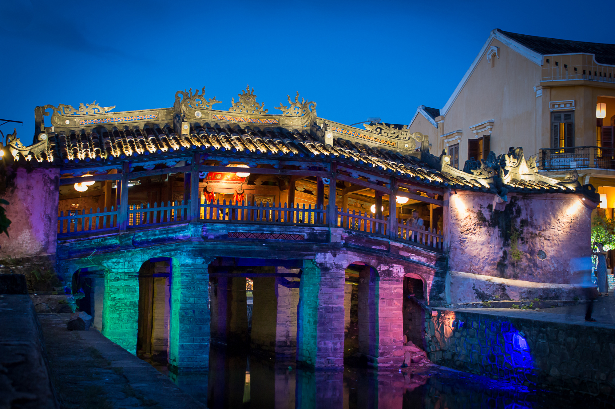 Pont-pagode "japonais" de Hoi-an, vue de nuit